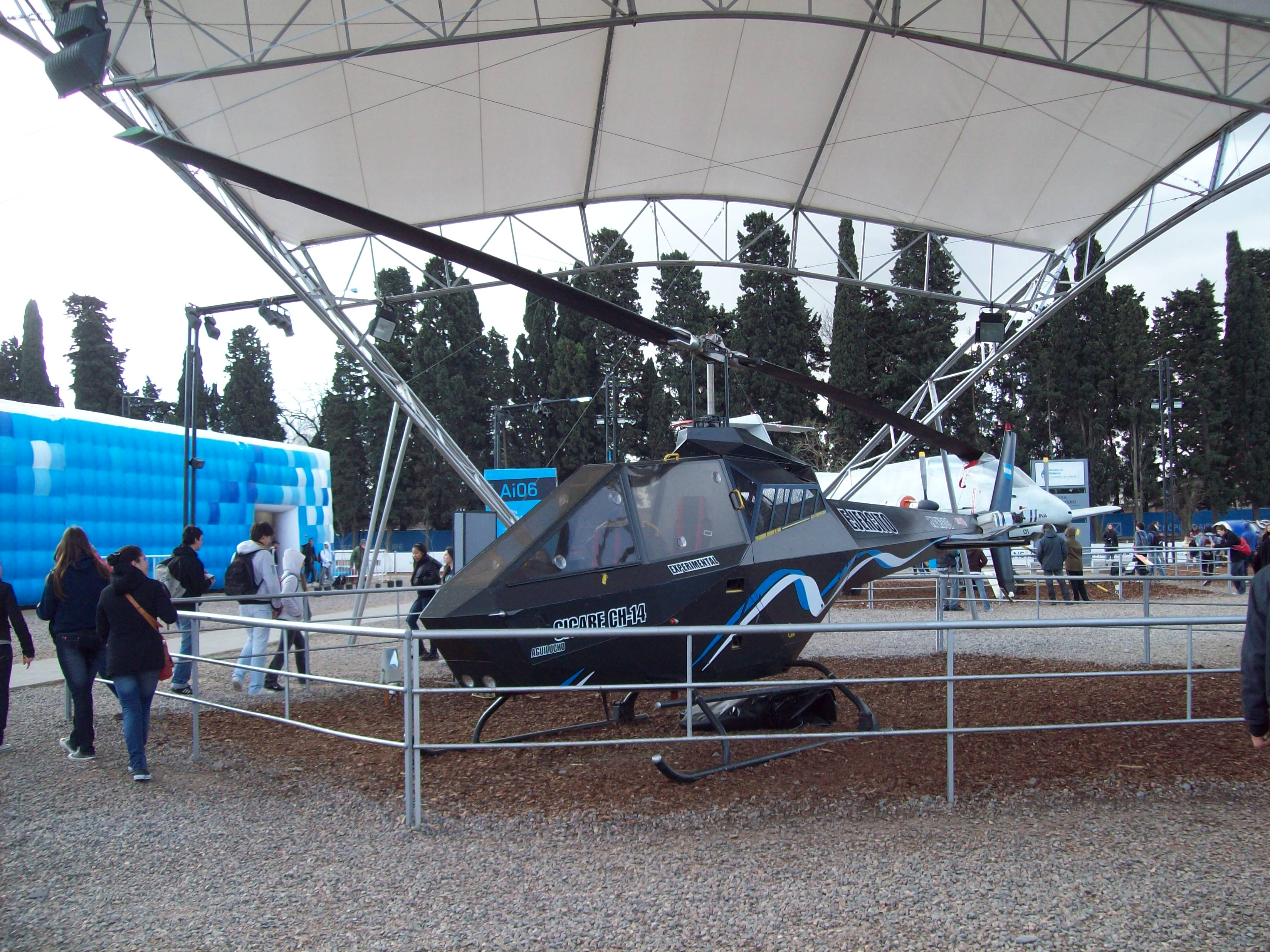 Helicoptero Cicaré CH-14.